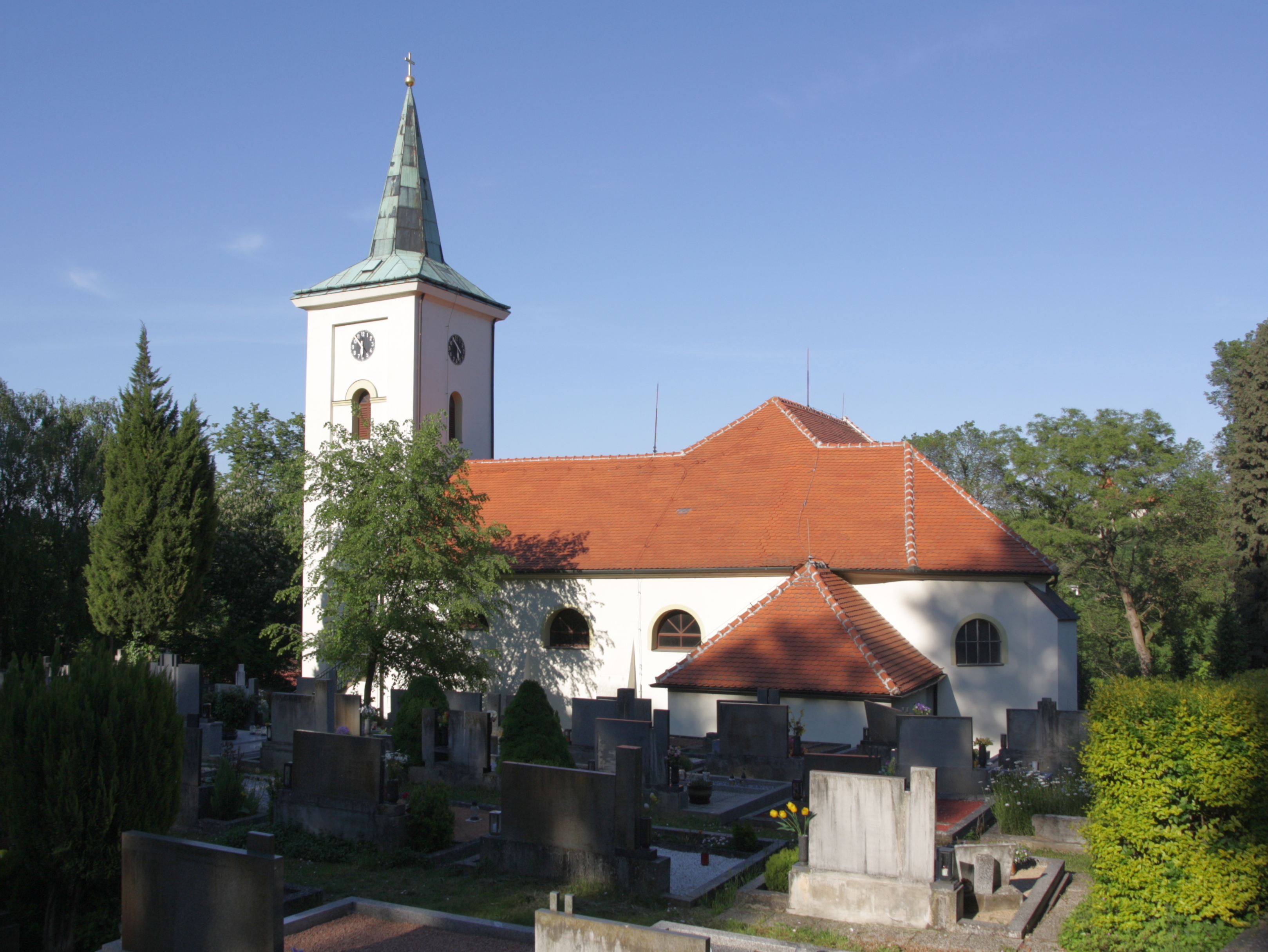 Bošovice - kostel svatého Stanislava, pohled od jihozápadu.